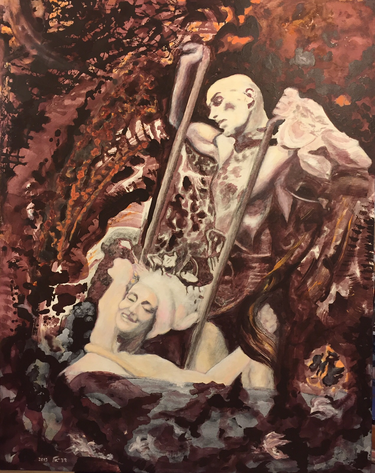 אורפיאו ואאורידיצ'ה, אקרילי על בד 134 על 105